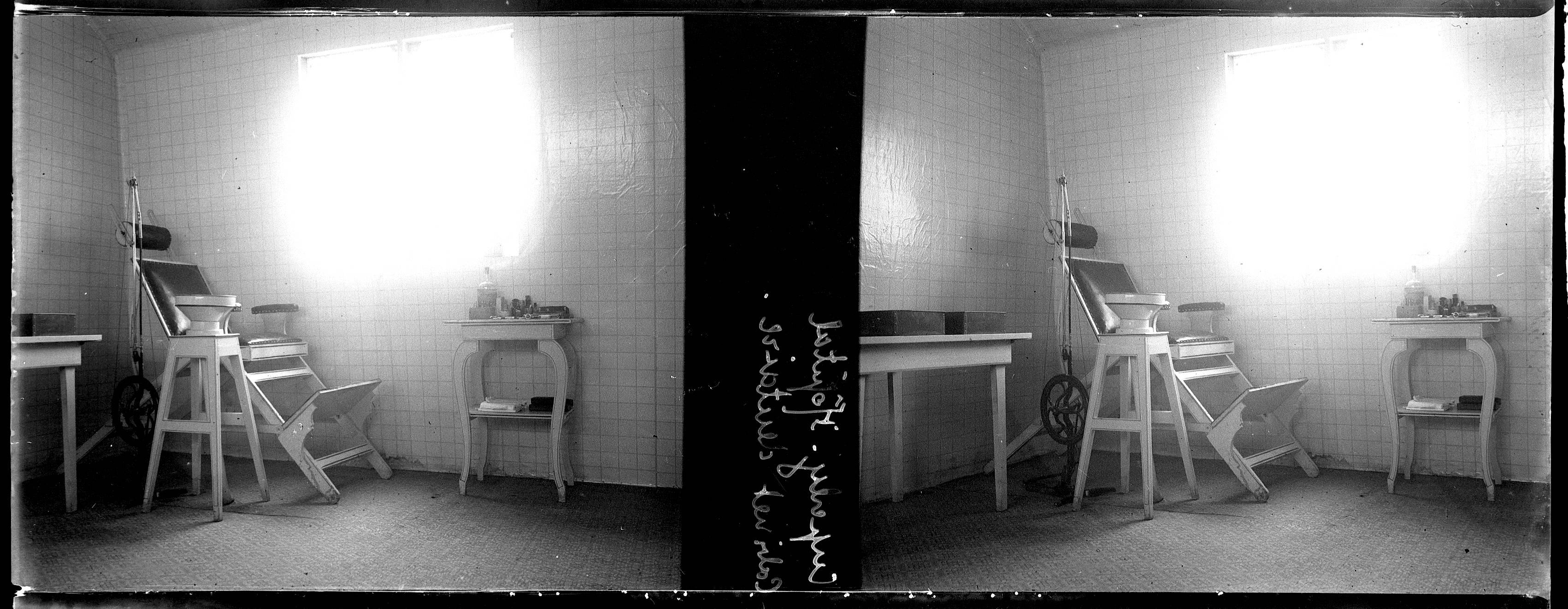 Vue du cabinet dentaire de l'hôpital d'évacuation de Cuperly (Marne). 1916. Guerre 1914-1918. Au centre le fauteuil de soins.